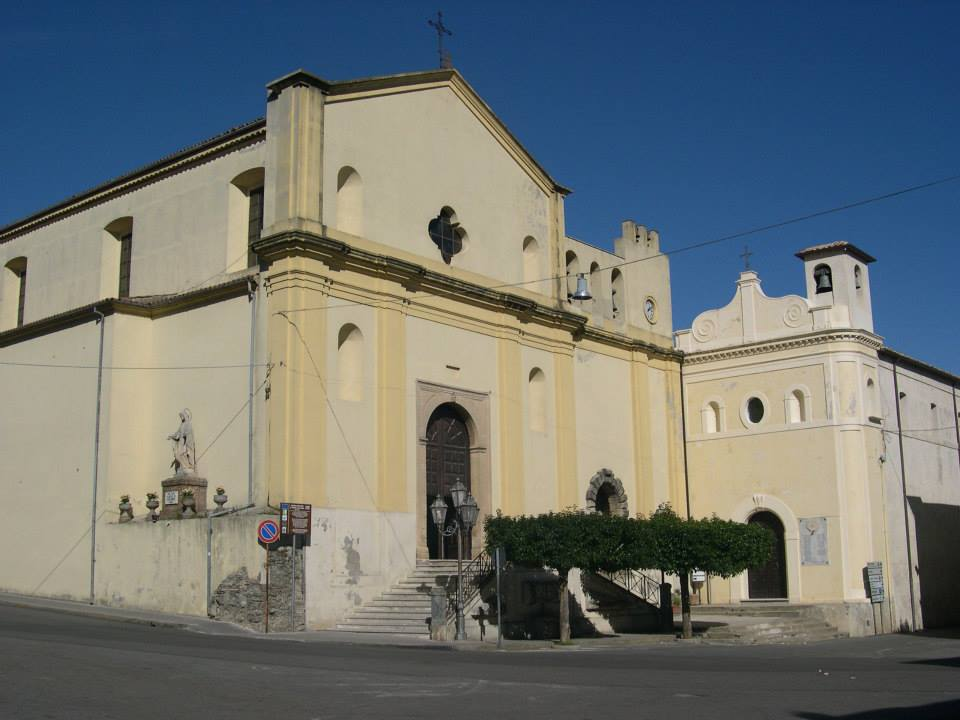 Chiesa Matrice o Santa Maria delle Nevi: costruita sul sedime della cappella del convento dei Domenicani, del quale sono ancora visibili le rovine alla destra della Chiesa. Un tempo la chiesa si trovava nei pressi della Chiesa di San Rocco, ma il terremoto del 1783 la distrusse. Il paese si stava espandendo e così i cittadini decisero di collocarne la sede nell'attuale posizione più centrale